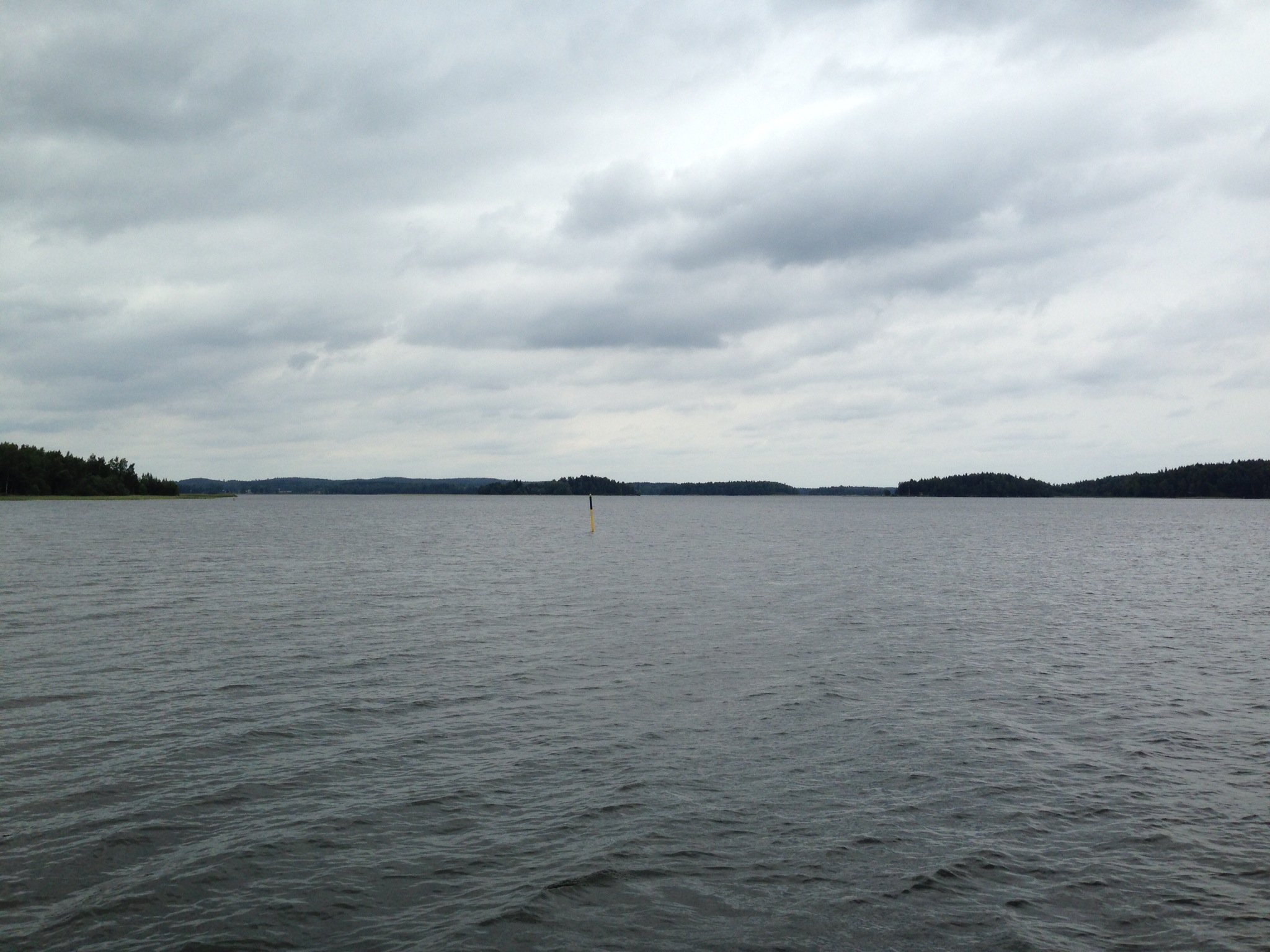 Längelmävesi Kaivannosta pohjoiseen nähtynä.